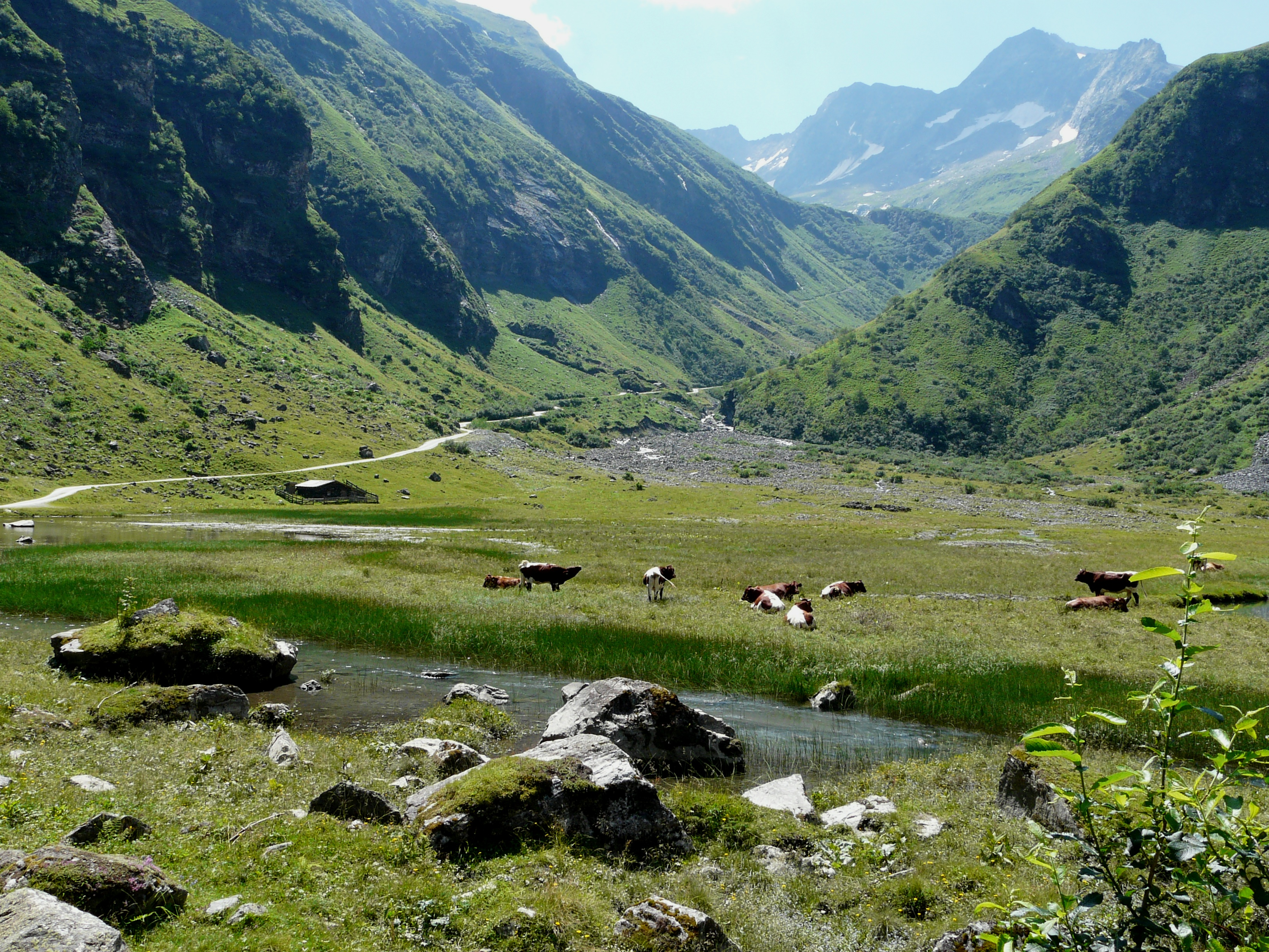 Blick vom Ofnerboden in den Talschluss des Hollersbachtals